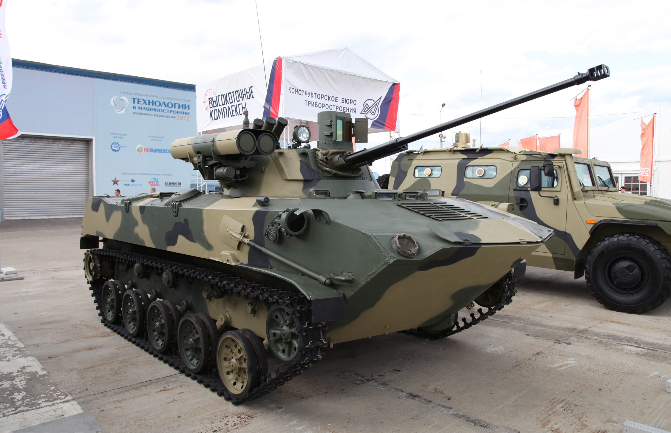 БМД-2 с модернизированным боевым отделением (BMP-2 with upgraded fighting compartment)